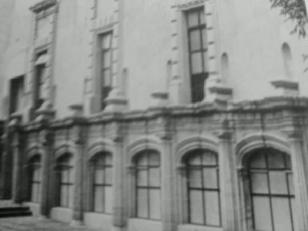 La casa de los mascarones despues de su restauración